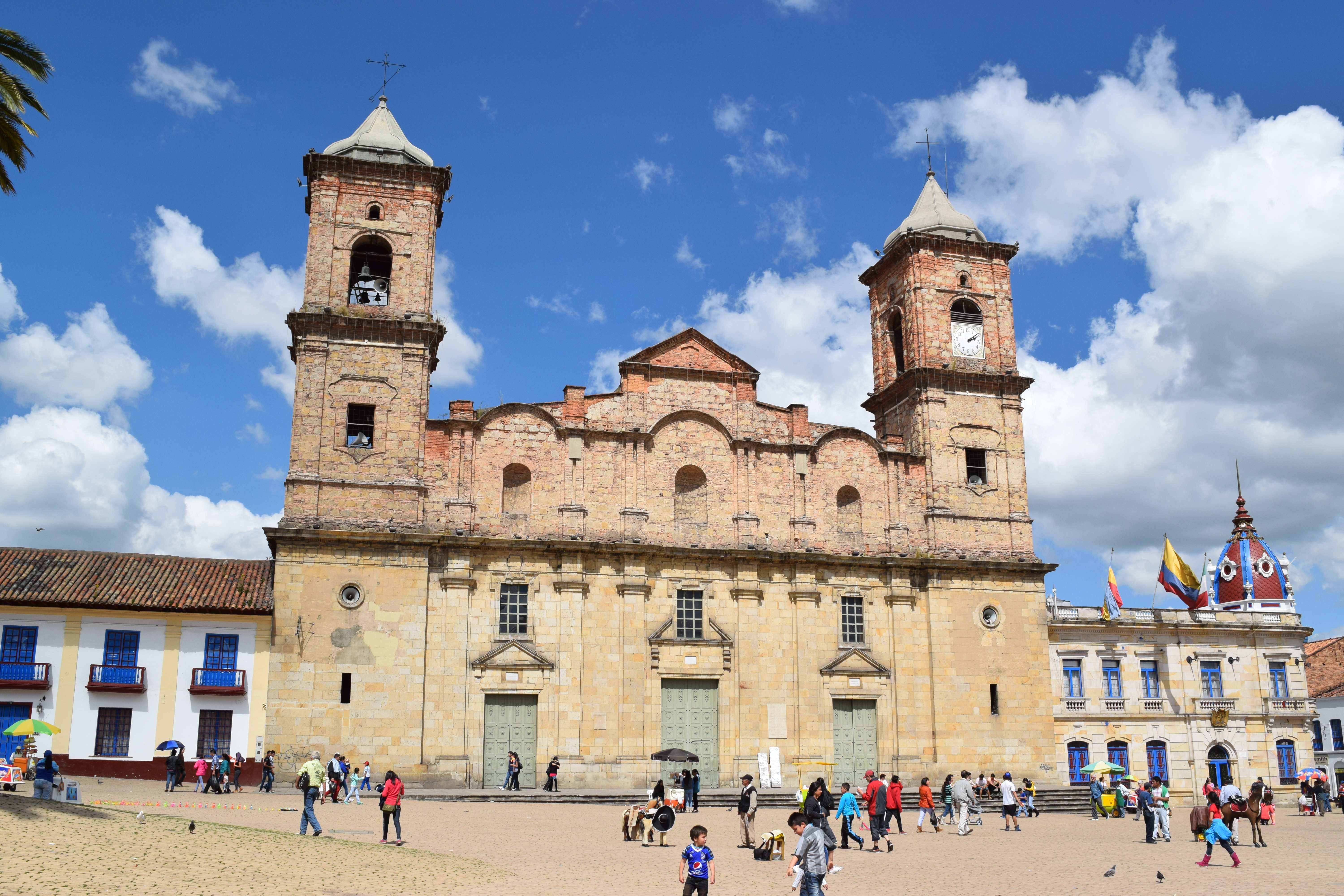 Iglesia principal de Zipaquirá, ubicada en el parque de los comuneros.